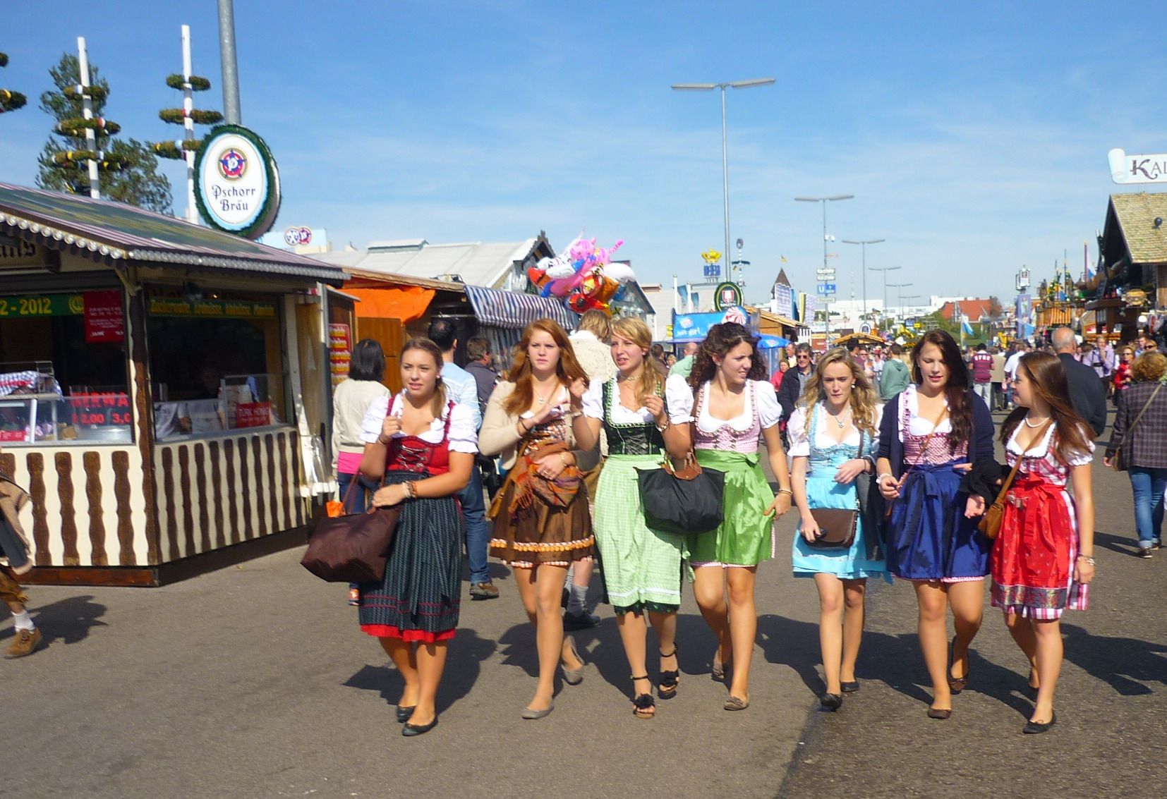 München, Oktoberfest 2012, Dirndl